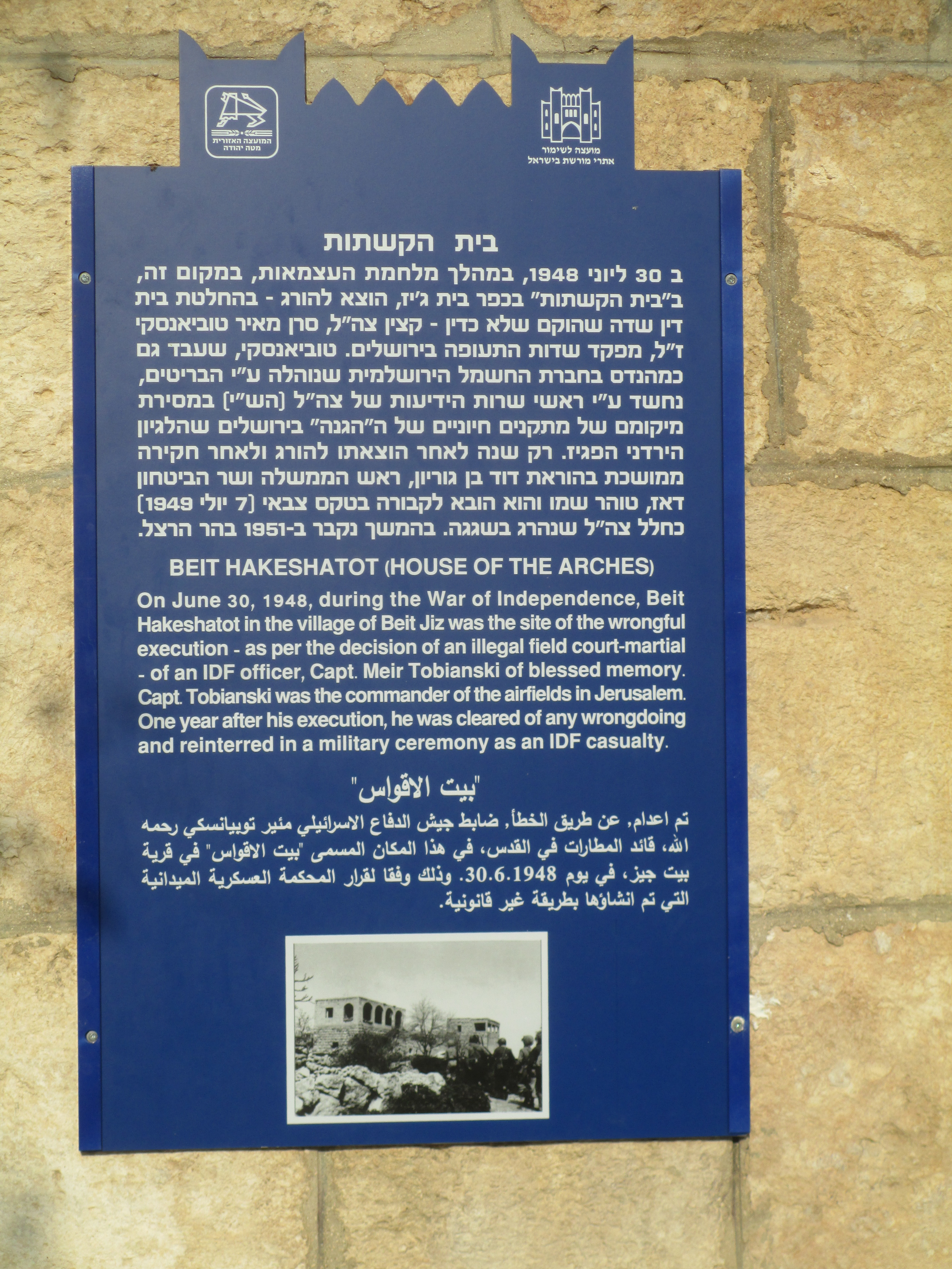 שלט על פרשת טוביאנסקי בבית הקשתות בקיבוץ הראל